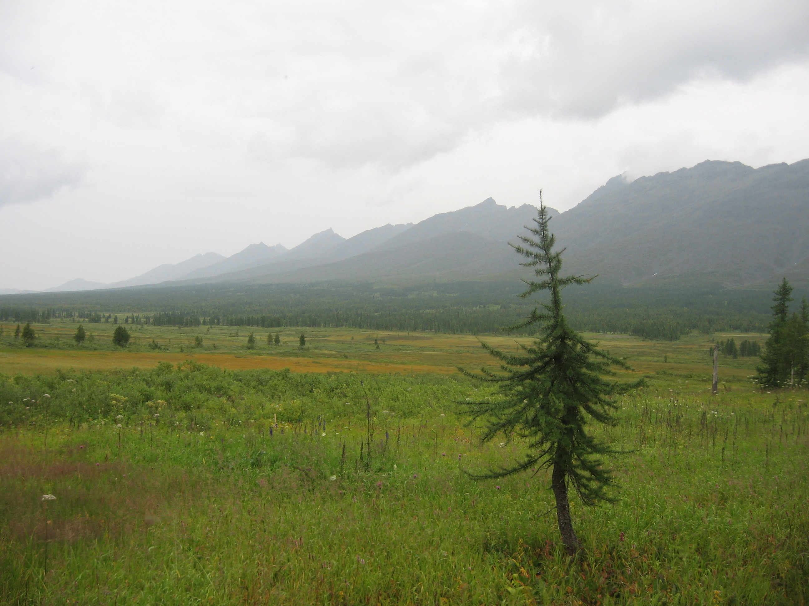 Сабля заказник, Печорский район This image is related to the protected area of Russia number 1110242